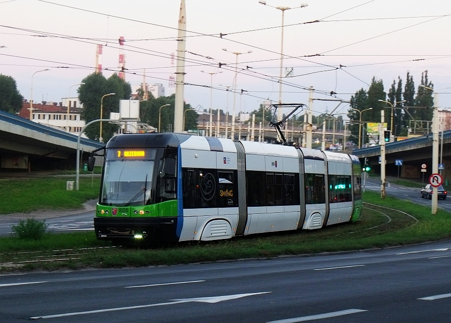 PESA 120NaS2 #808 w obsłudze linii 7